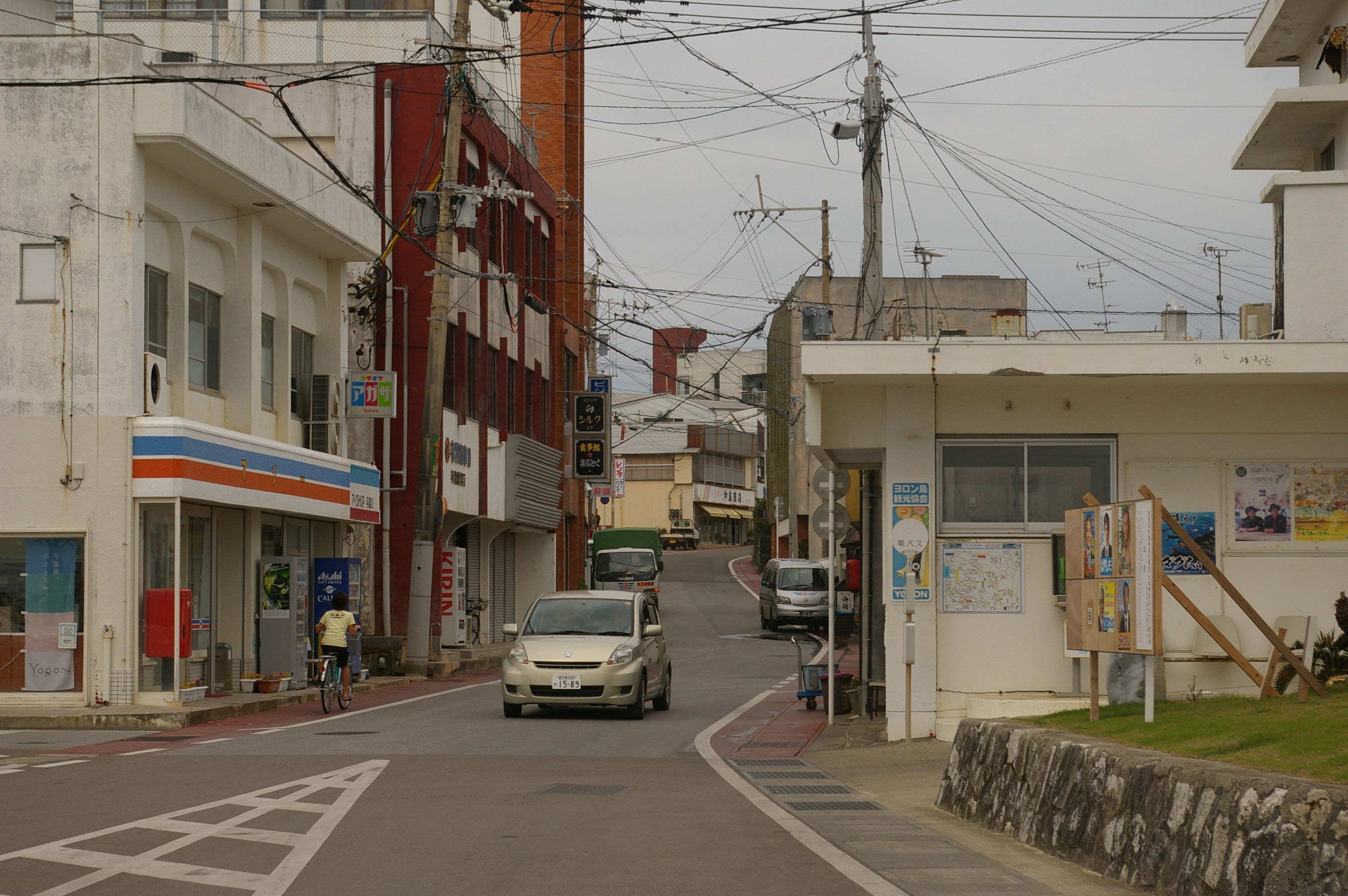 与論町役場前の街並み（右側の建物は観光案内所）